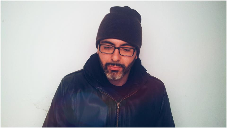 Imagen del mc español Juaninacka